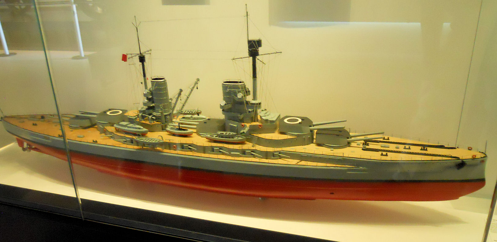 Modell des Linienschiffes SMS Markgraf